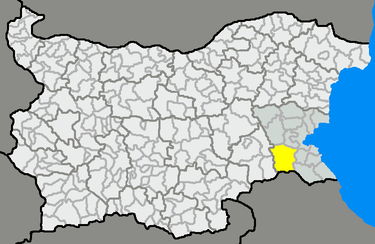 Община Средец на картата на област Бургас, България